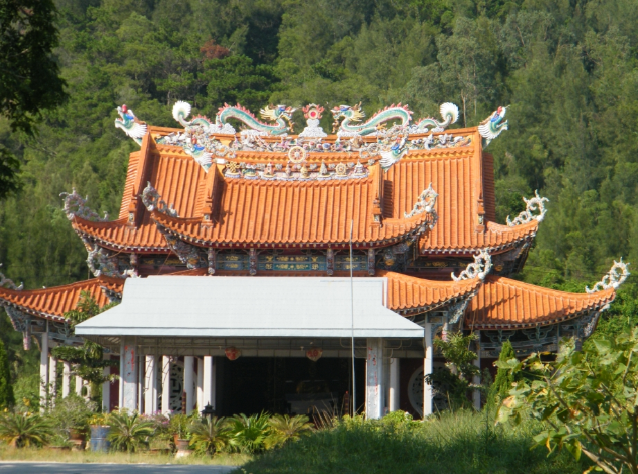 达濠东湖岭脚大峰宝殿